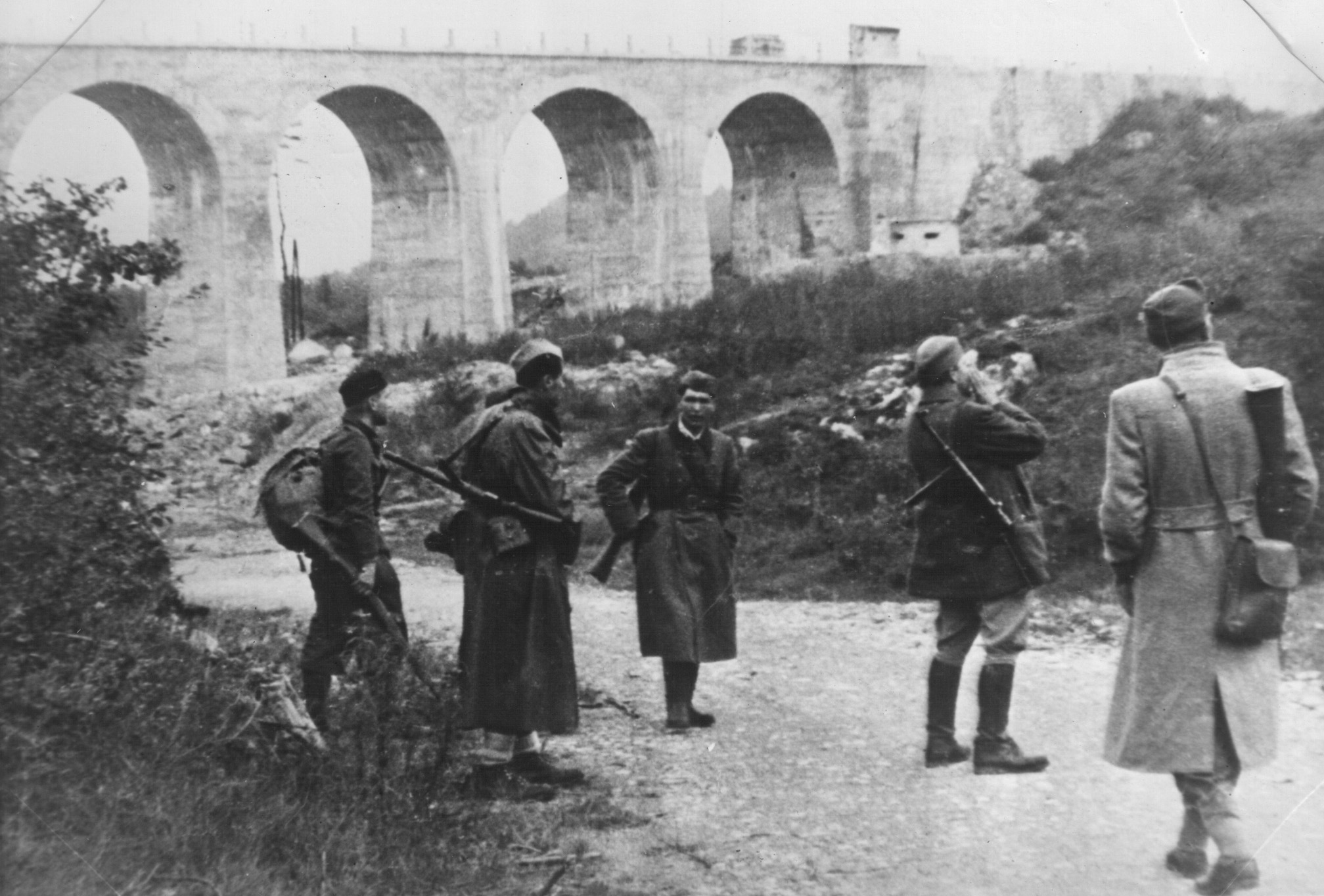 Srpskohrvatski / српскохрватски: Borci Tomšičeve brigade uoči rušenja Štampetovog mosta.